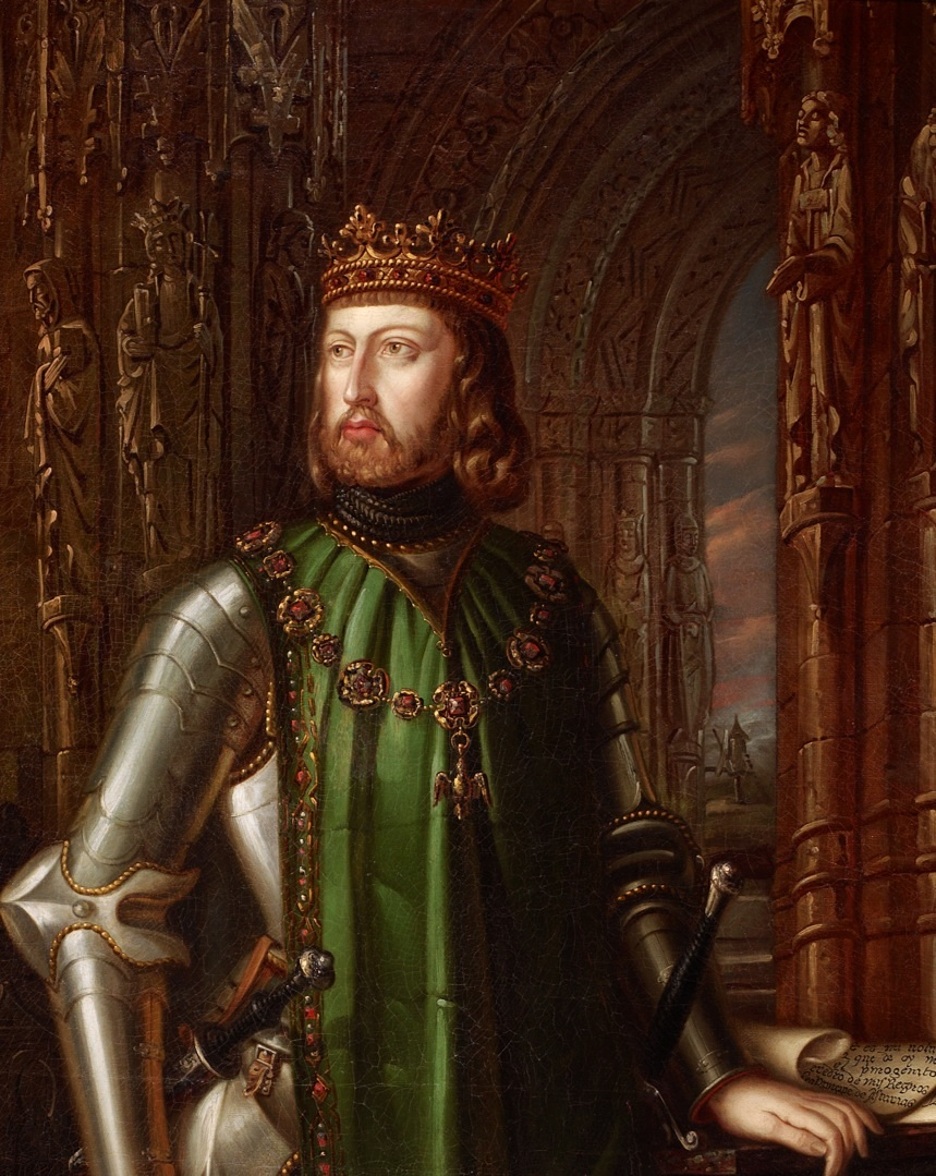 Detalle del óleo decimonónico que se conserva en el Congreso de los Diputados y en el que se observa la cadena de la Orden de la Paloma.